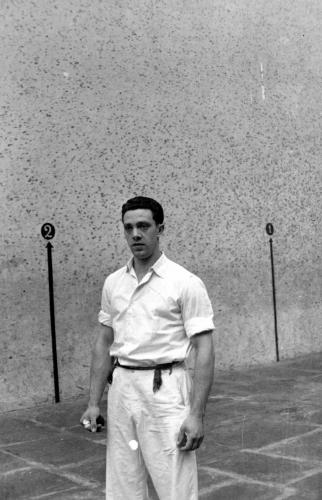 Miguel Soroa in 1960